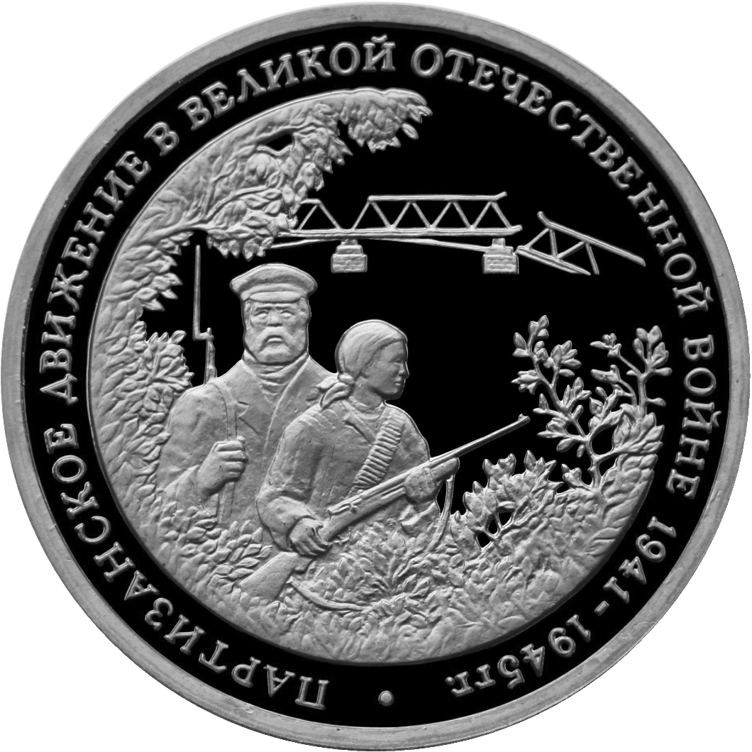 Монета Банка России — Серия: «Великая Отечественная война», 50-летие Победы в Великой Отечественной войне, Партизанское движение в Великой Отечественной войне, 3 рубля, реверс.